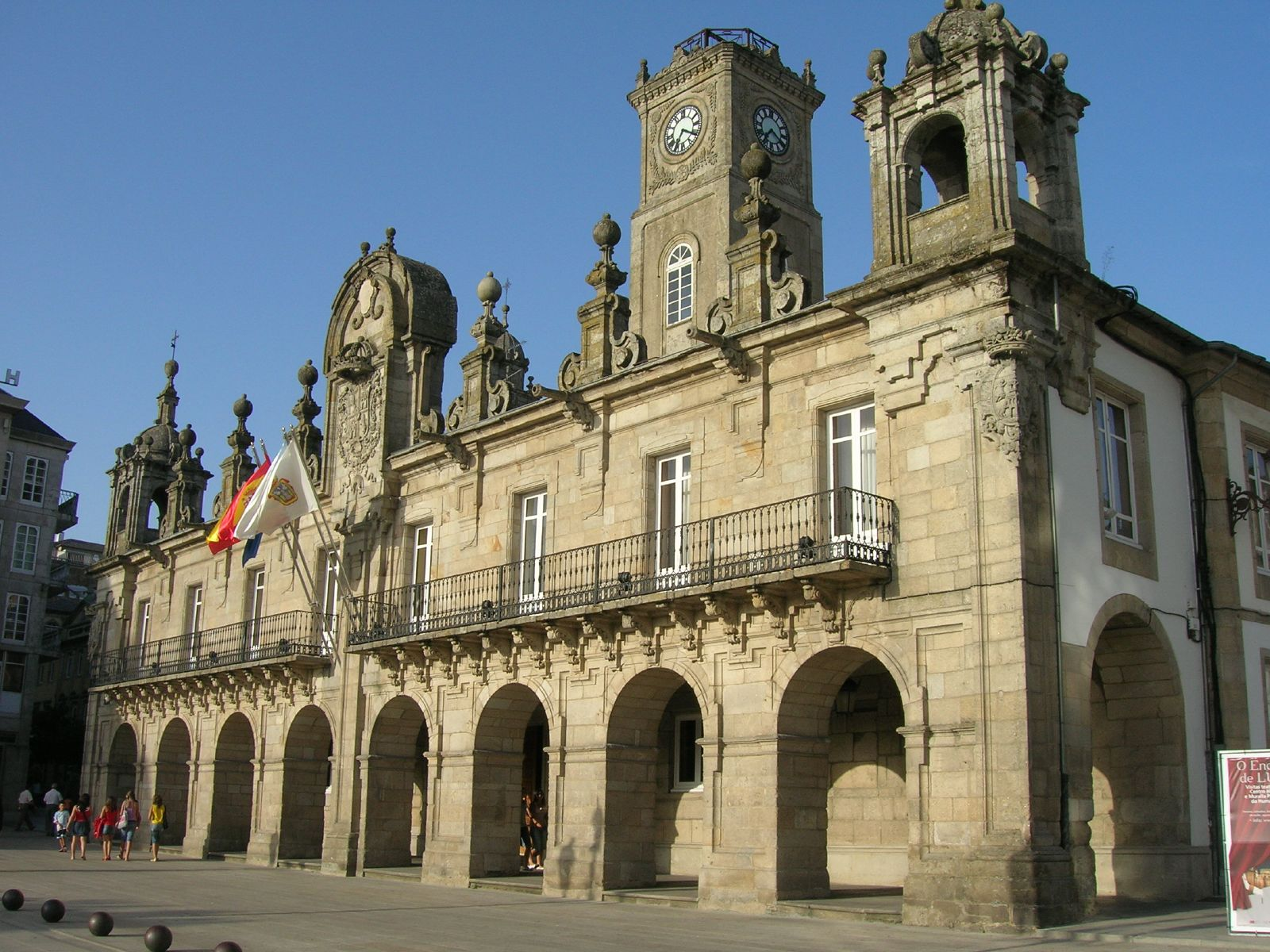 Ayuntamiento de Lugo